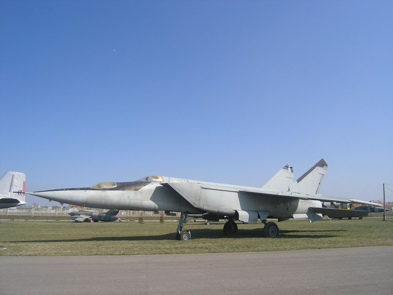 МиГ-25РУ в Техническом музее Тольятти